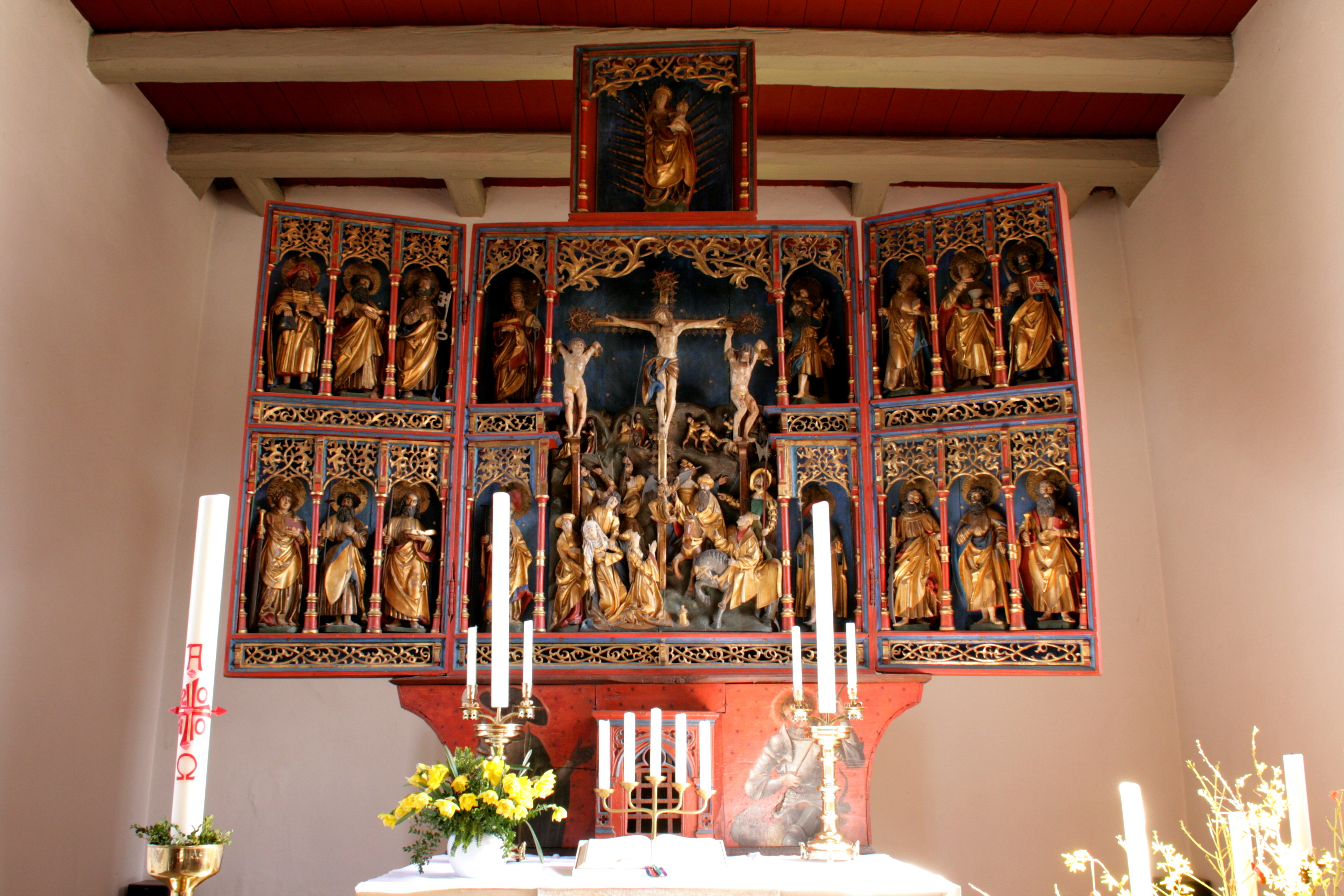 St.-Georgs-Kirche an der Billungstraße in Wichmannsburg, Bienenbüttel